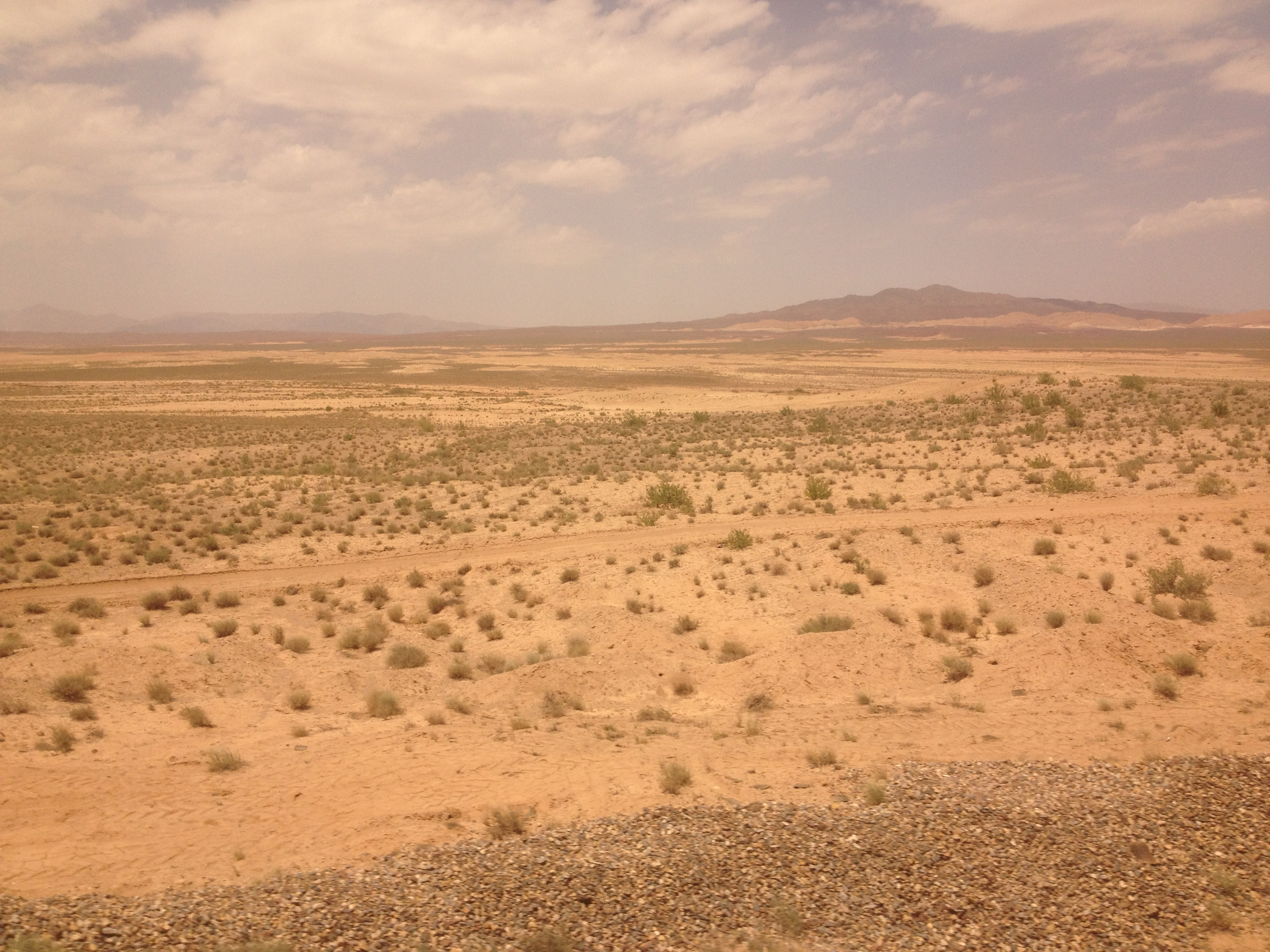 کویر مرکزی ایران - سمنان حوالی مسیر شاهرود-مشهد